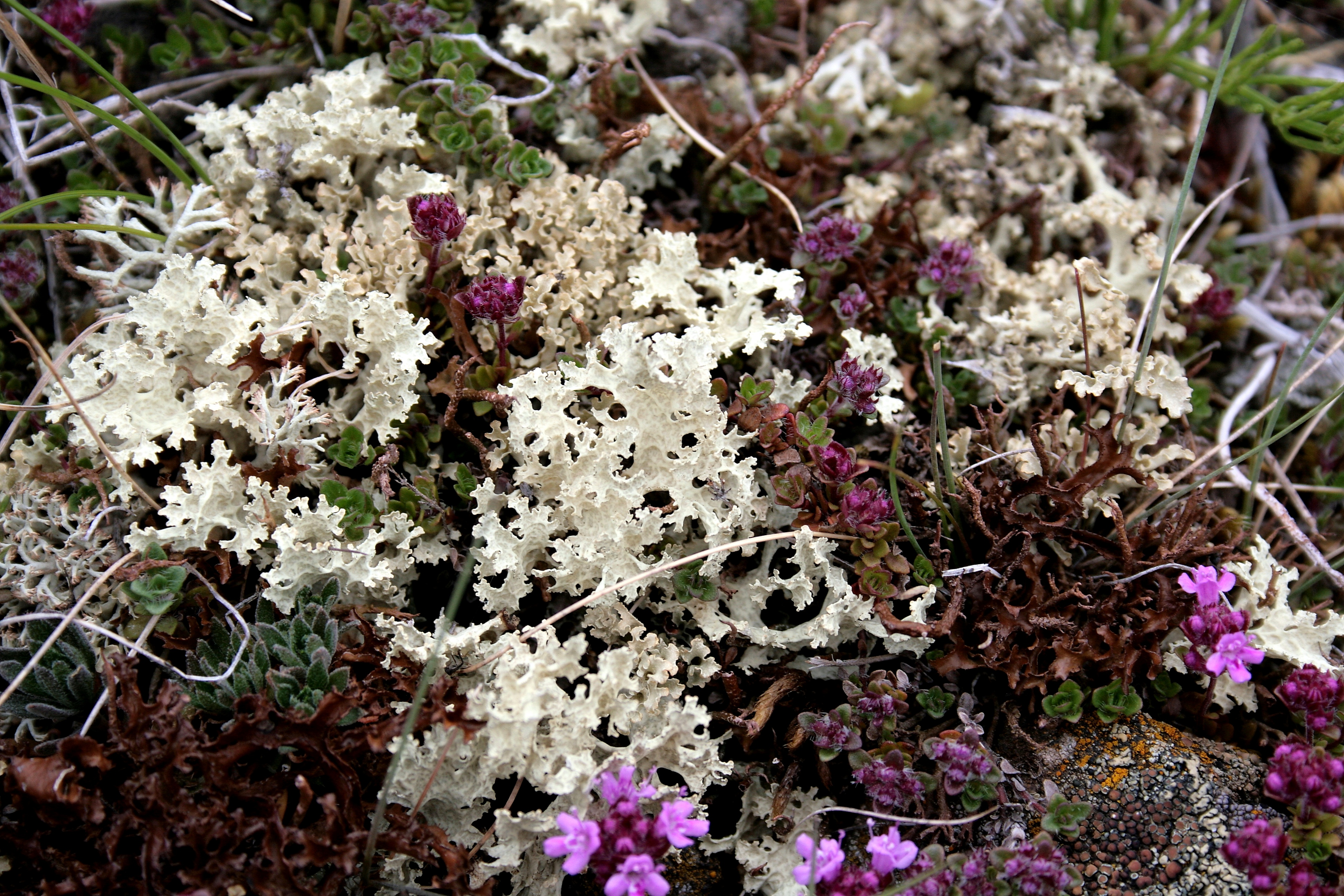 Isländisches_Moos_(Cetraria_islandica) rechts und Schneeflechte (links) am_Mývatn